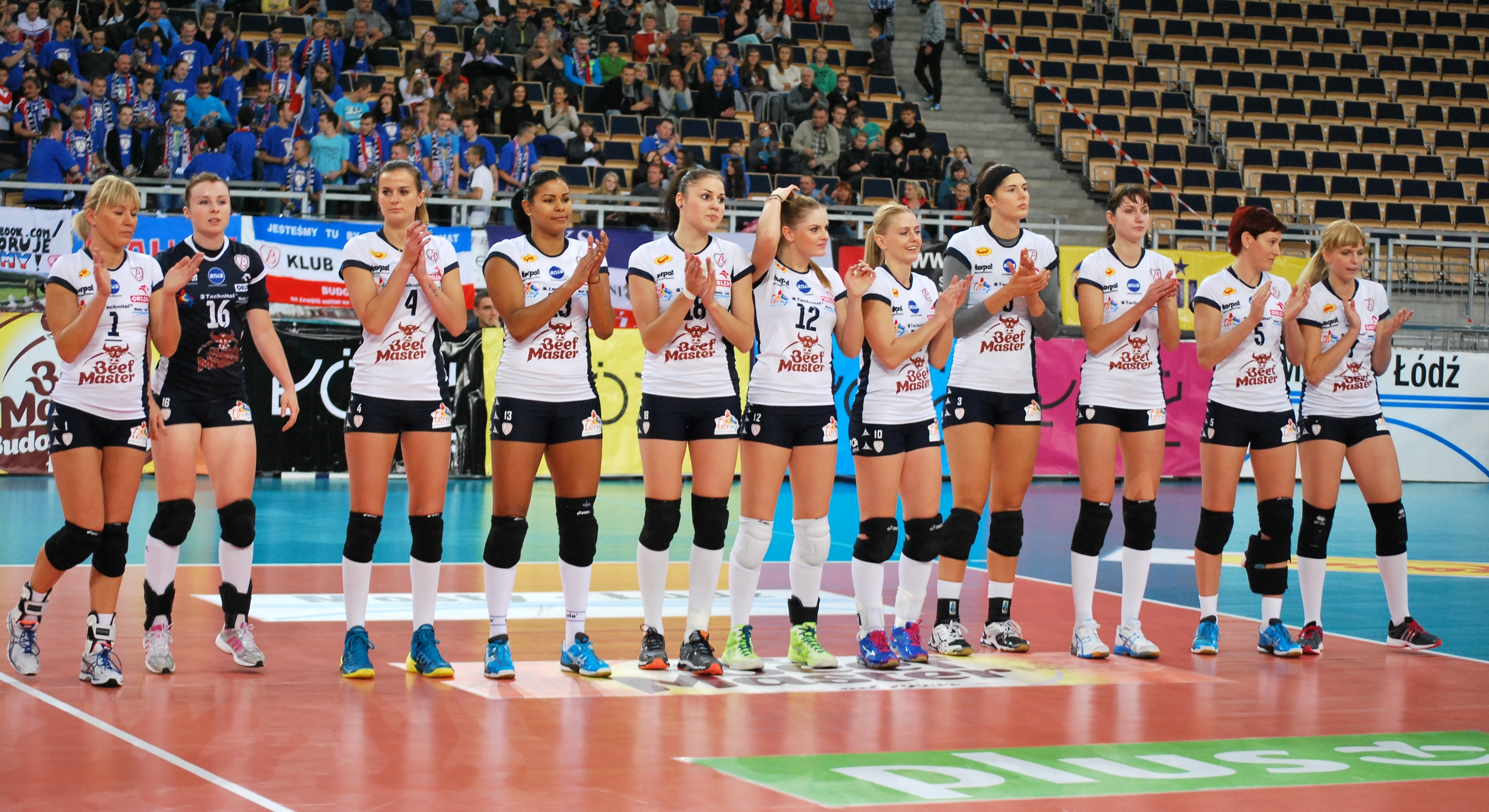 Budowlani Łódź w sezonie 2013-14